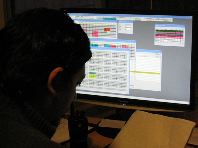 Hafenarbeit im Wandel durch die Containerisierung